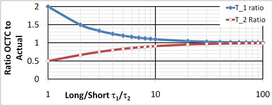 Plot comparing open-circuit time constant estimates against actual values